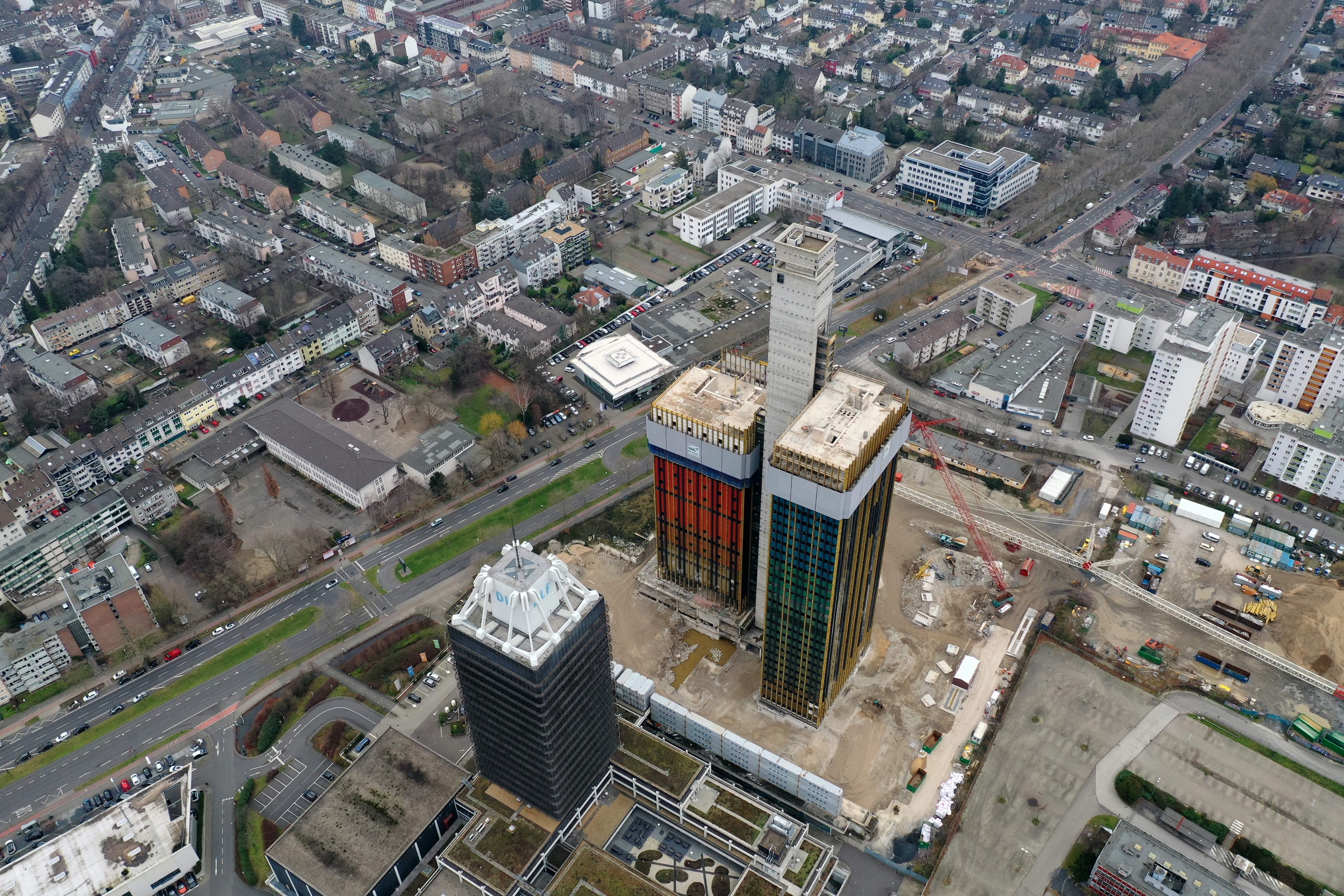 Die Drohnenaufnahme von Südwesten zeigt links den Deutschlandfunk und rechts davon die beiden Türme der ehemaligen Deutschen Welle. Der Aufzugtrakt hat die ursprüngliche Höhe, die beiden Türme sind bereits erheblich zurückgebaut. Das Foto ist aus einer Höhe von exakt 300 Metern entstanden. Dazu gab es eine explizite Freigabe der Deutschen Flugsicherung. In dieser Gegend sind (Stand 2020) nur 50 Meter Höhe über Grund erlaubt.